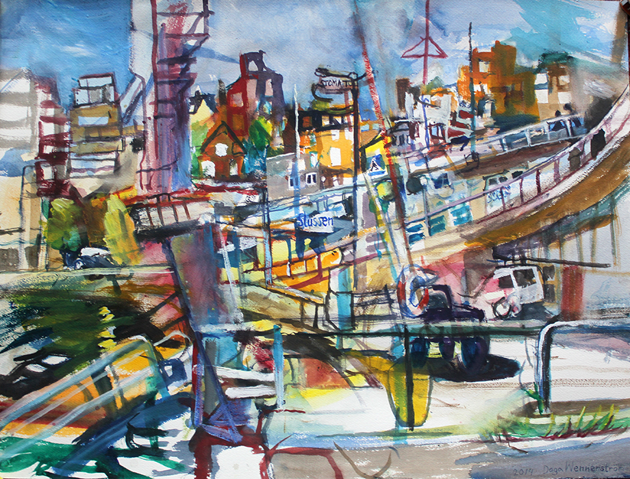 Akvarell Outdoor